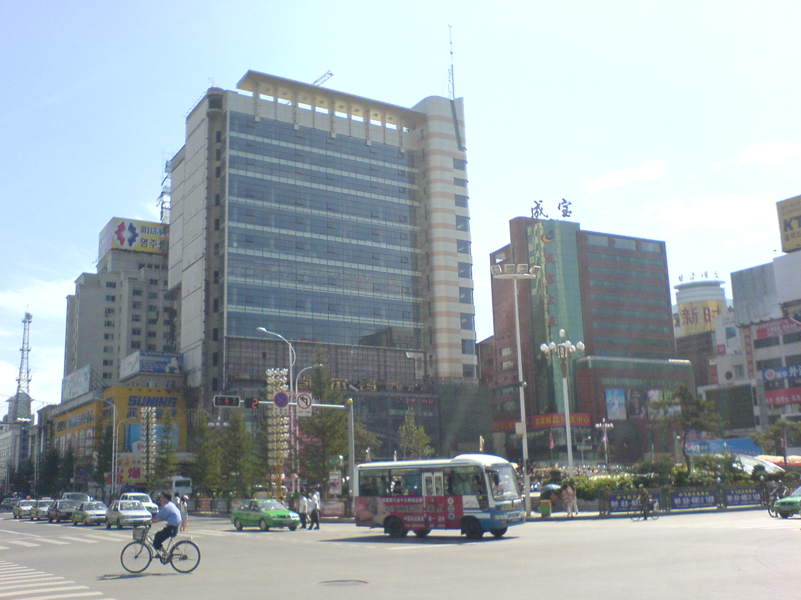 凯而玛